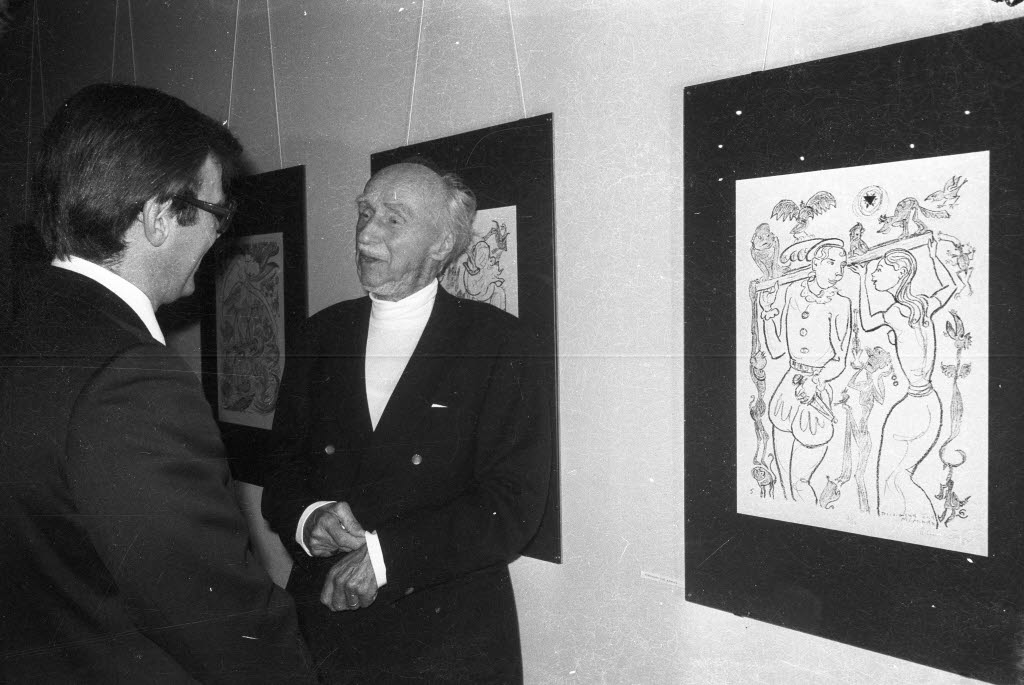 Eröffnung. Hans Leip (rechts) zeigt Kulturdezernent Karl Heinz Zimmer (links) seine Zeichnungen und Gemälde.